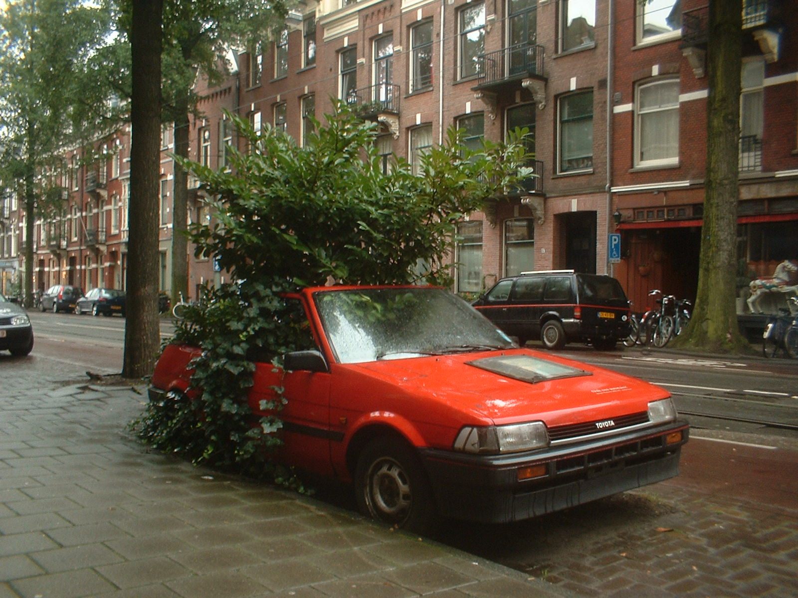 Autotuin, gefotografeerd voor Willemsparkweg 194 te Amsterdam op 15 september 2005; minder dan een etmaal voor vertrek naar laatste rustplaats.